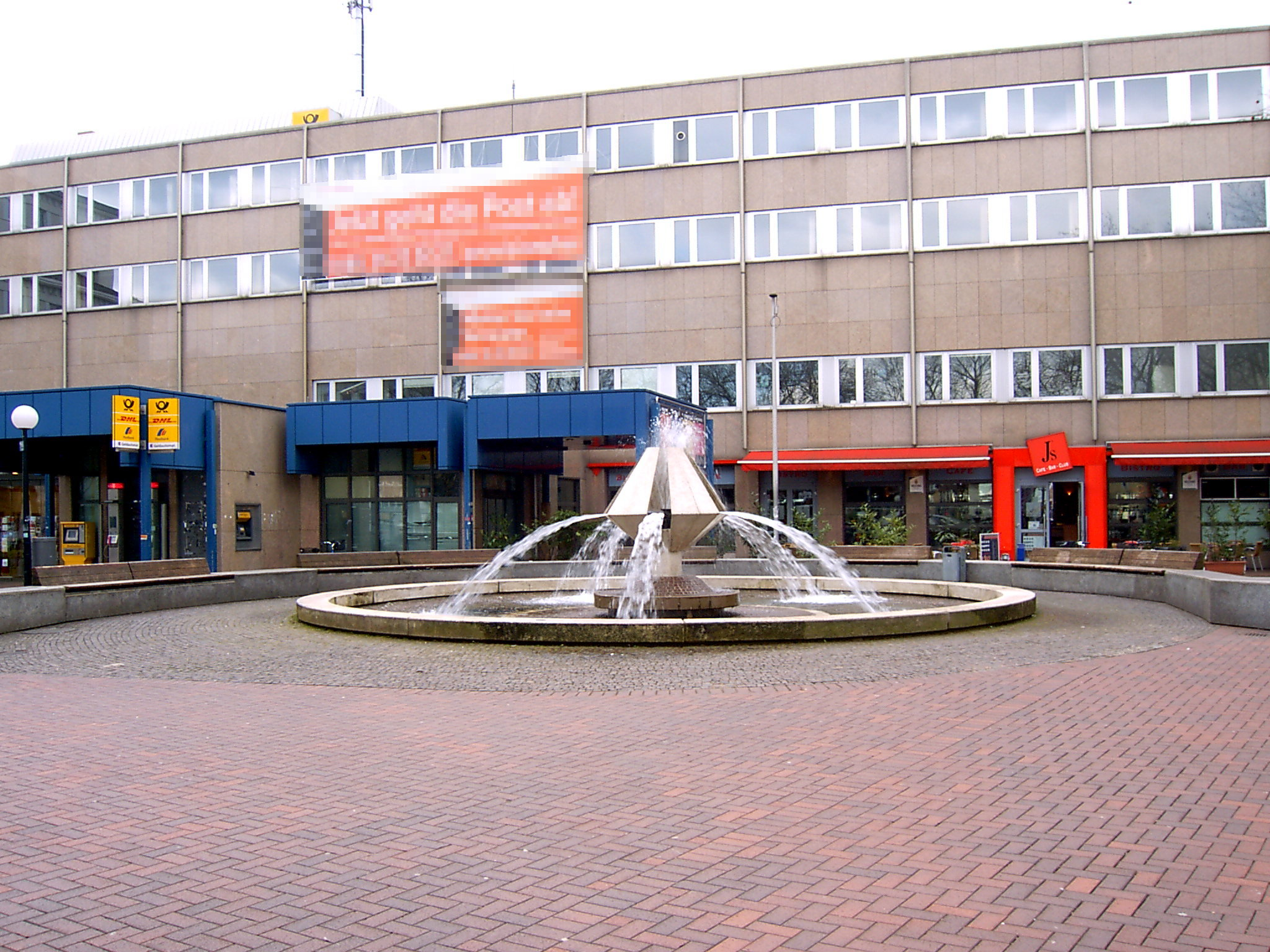 Brunnen auf dem Hindenburgplatz in Hildesheim